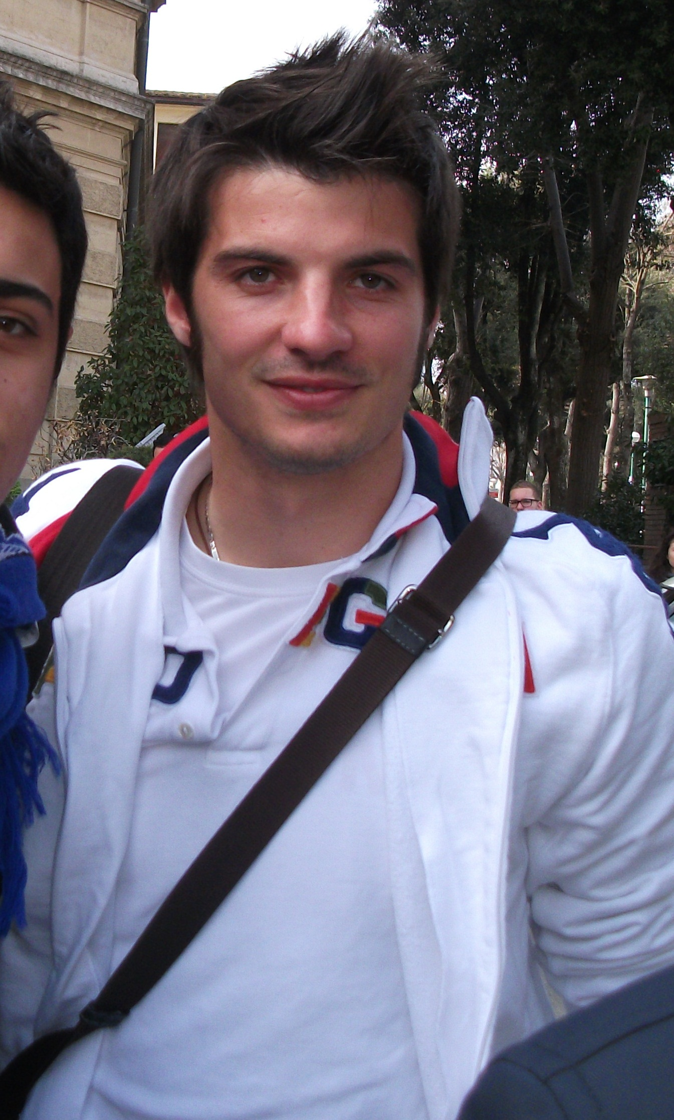 Michael Agazzi prima della partita di Serie A, Siena - Cagliari del 4 marzo 2012.